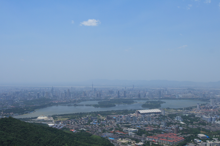 玄武湖